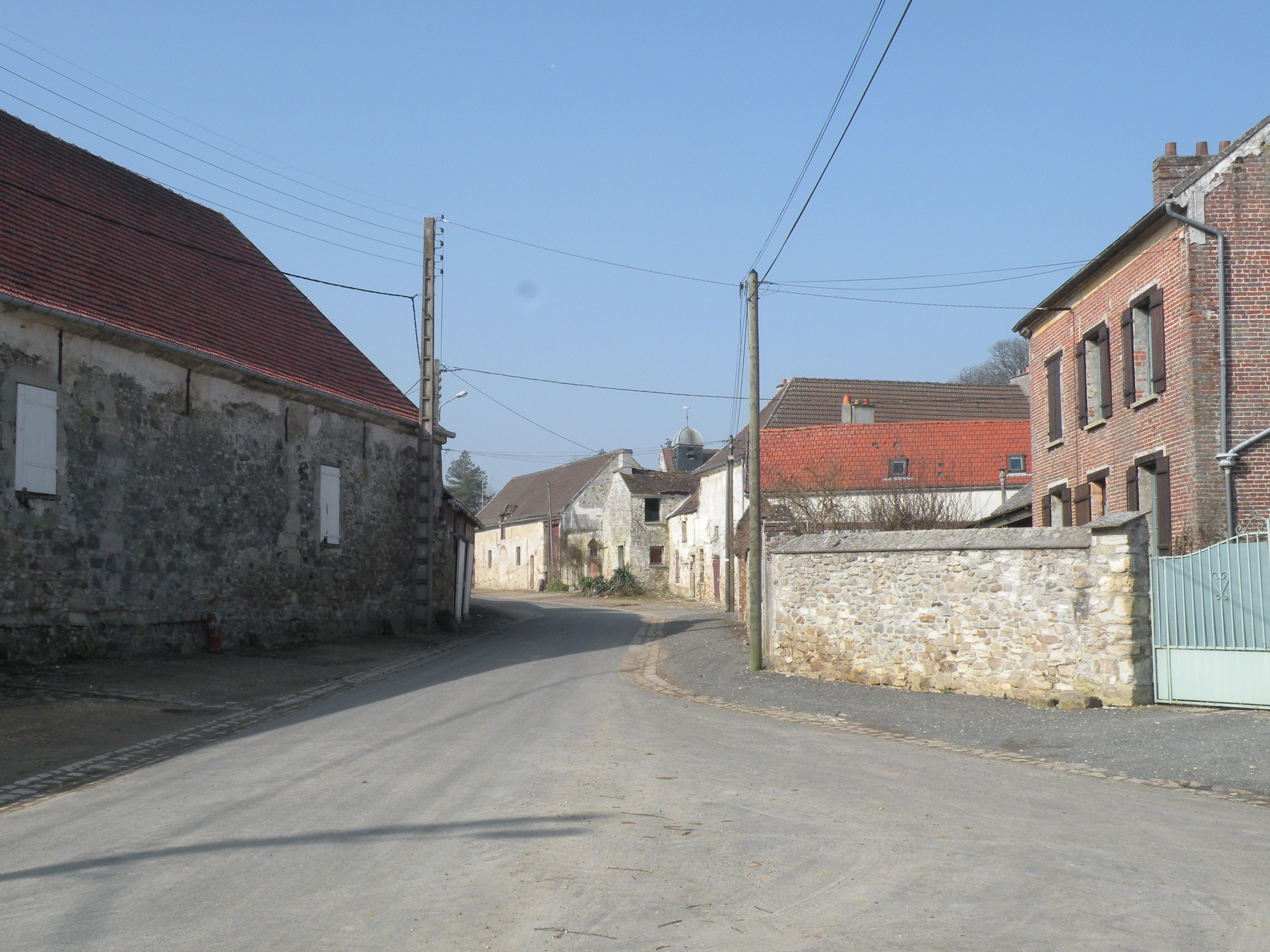 rue Rosières (Oise)